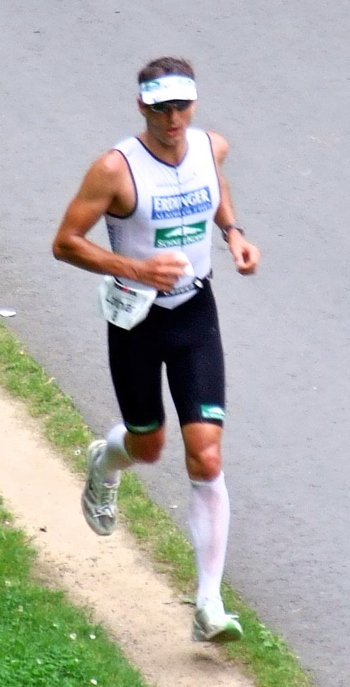 Lothar Leder auf der Strecke beim Ironman 2007 in Frankfurt